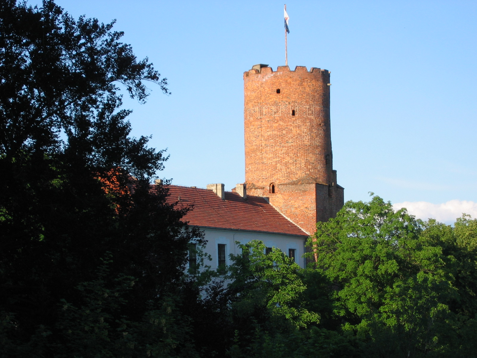 by: Wikipedysta:LukKot